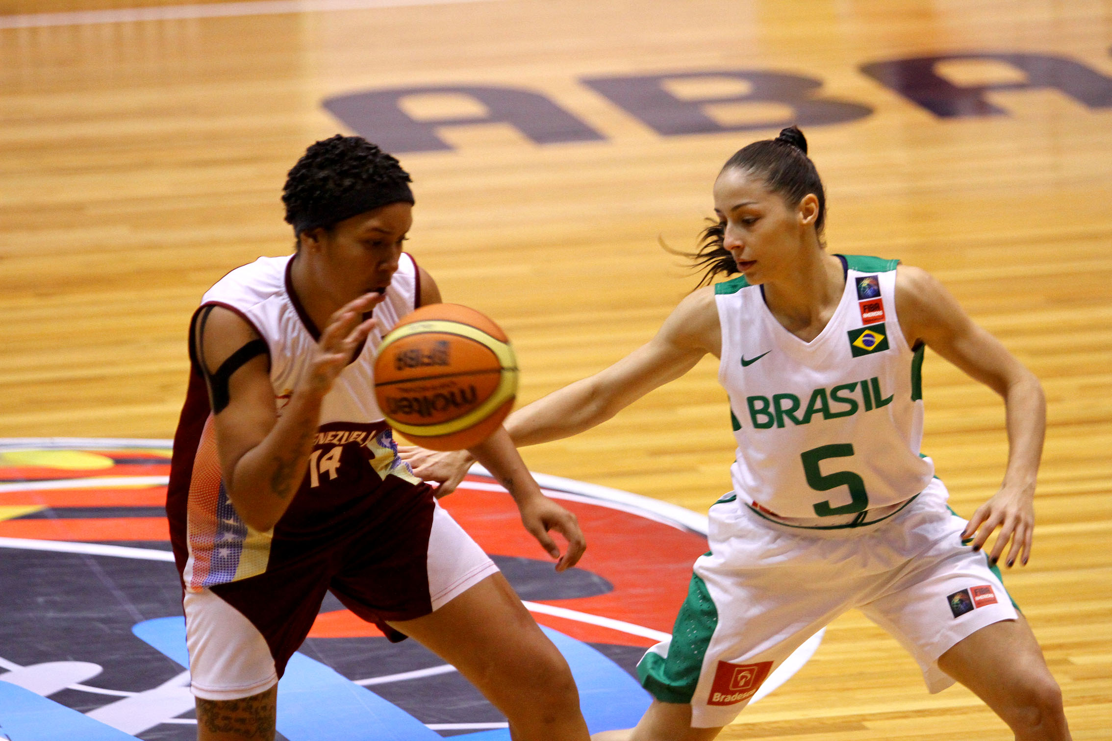 Ambato (Tungurahua) 14 de agosto de 2014 (Andes).- Inició el Campeonato Sudamericano de baloncesto Femenino Ambato 2014. Venezuela (blanco-vino) vs Brasil (blanco-verde). Foto: Luis Astudillo C.